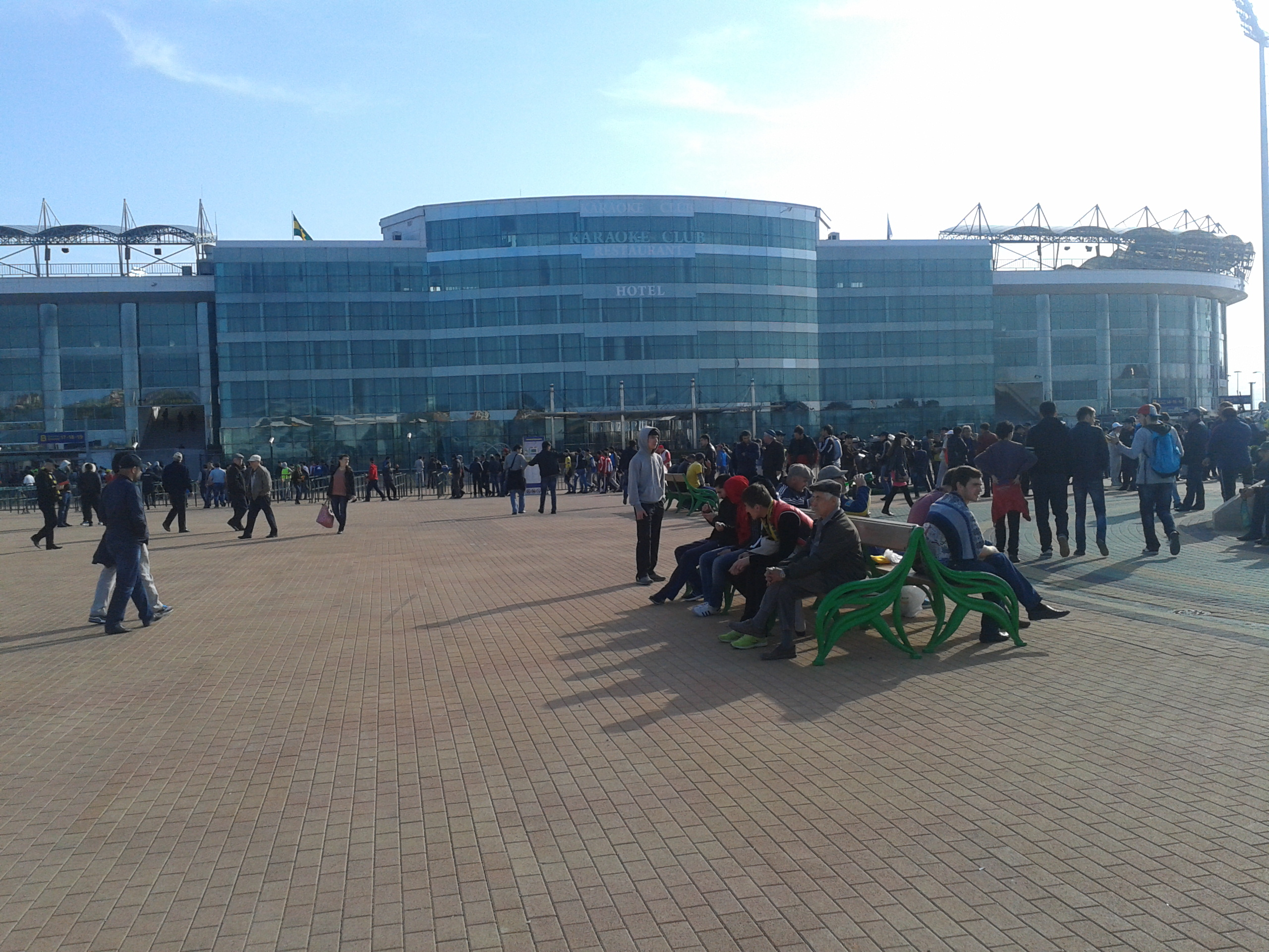 Анжи Арена